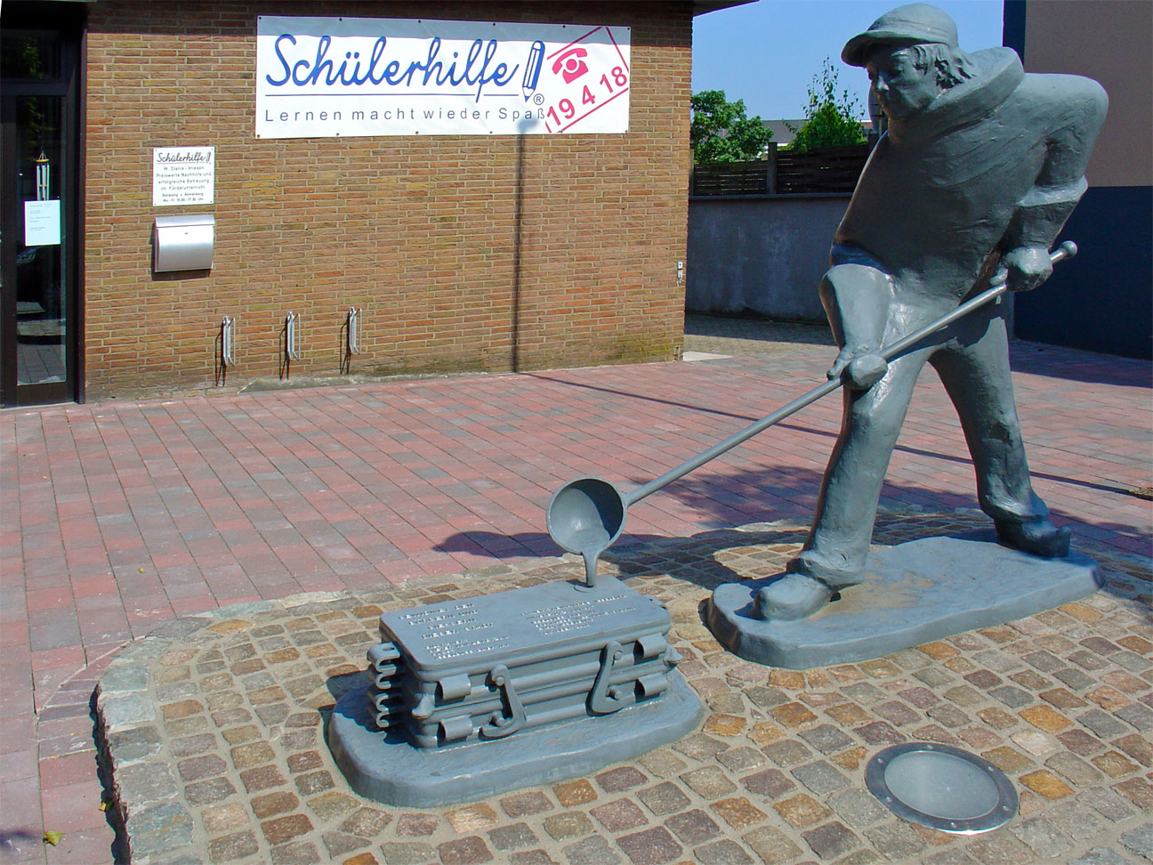 IJzergieter in Isselburg door Dieter von Levetzow (2008)